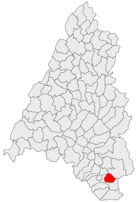 Categorie:Hărţi ale judeţului Bihor